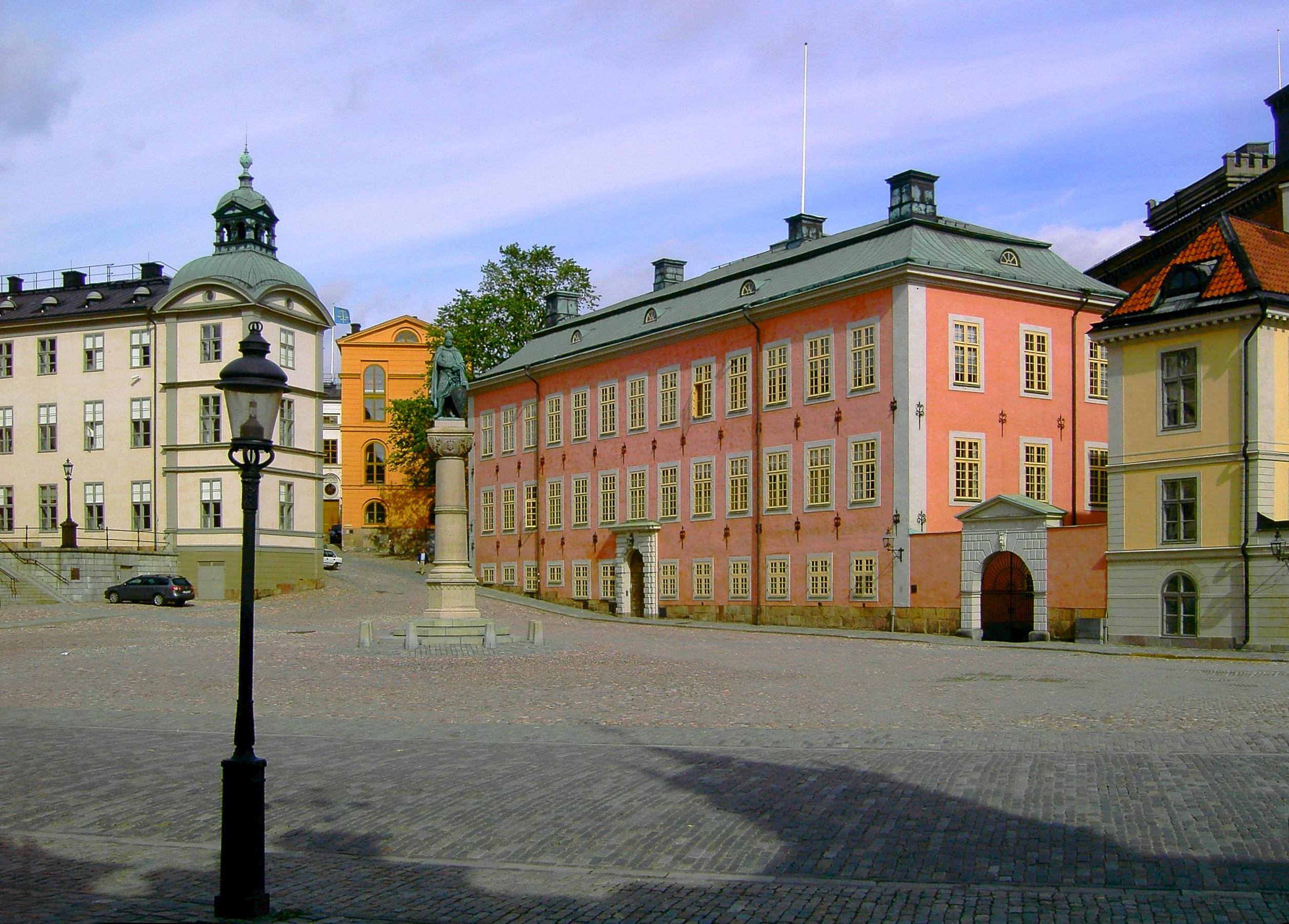 Birger jarls torg, Stockholm (Sweden), in the background: Regeringsrätten, Wrangelska palatset